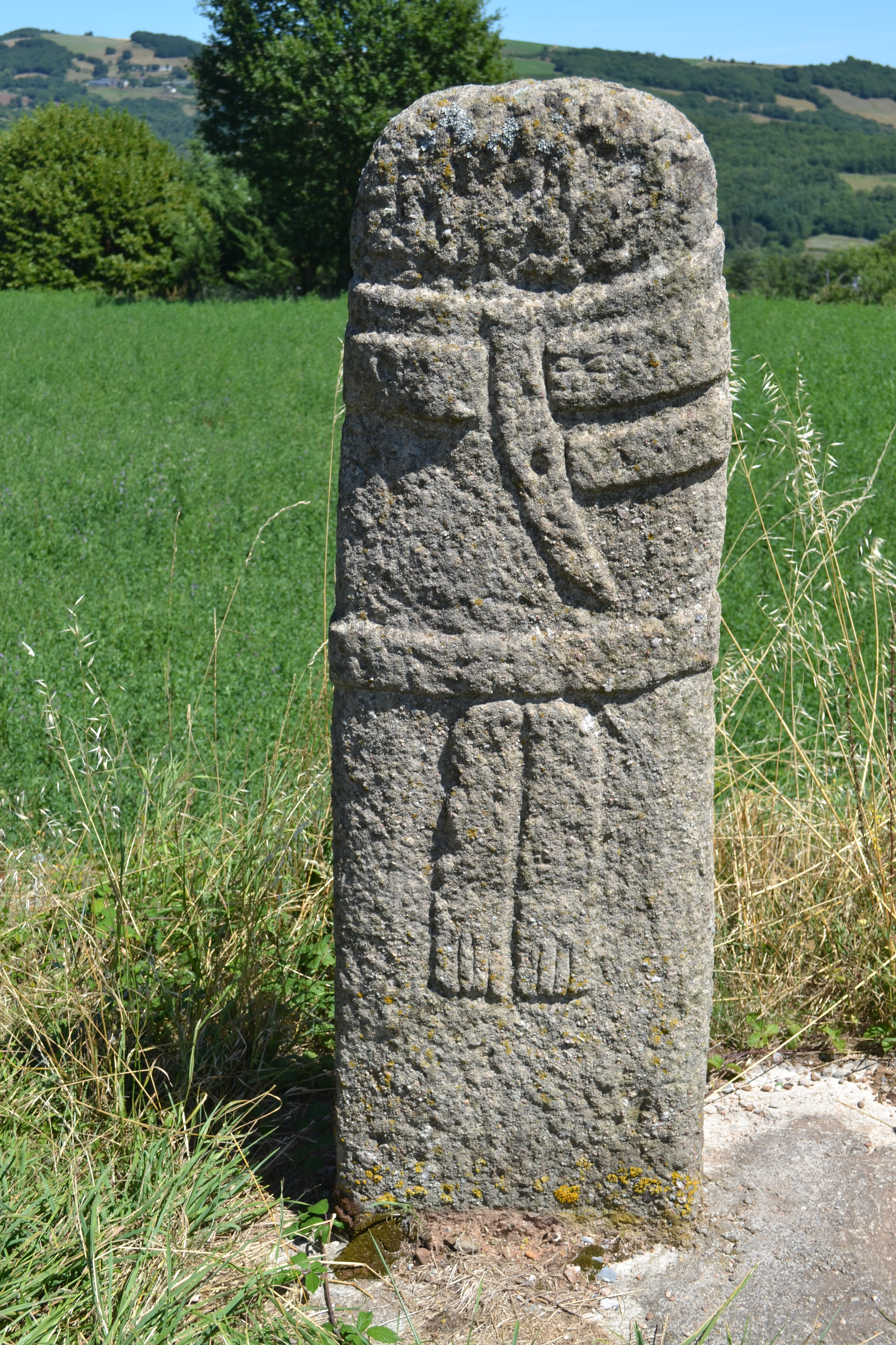 Copie de la statue-menhir (recto) n°2 de Pousthomy, Aveyron.